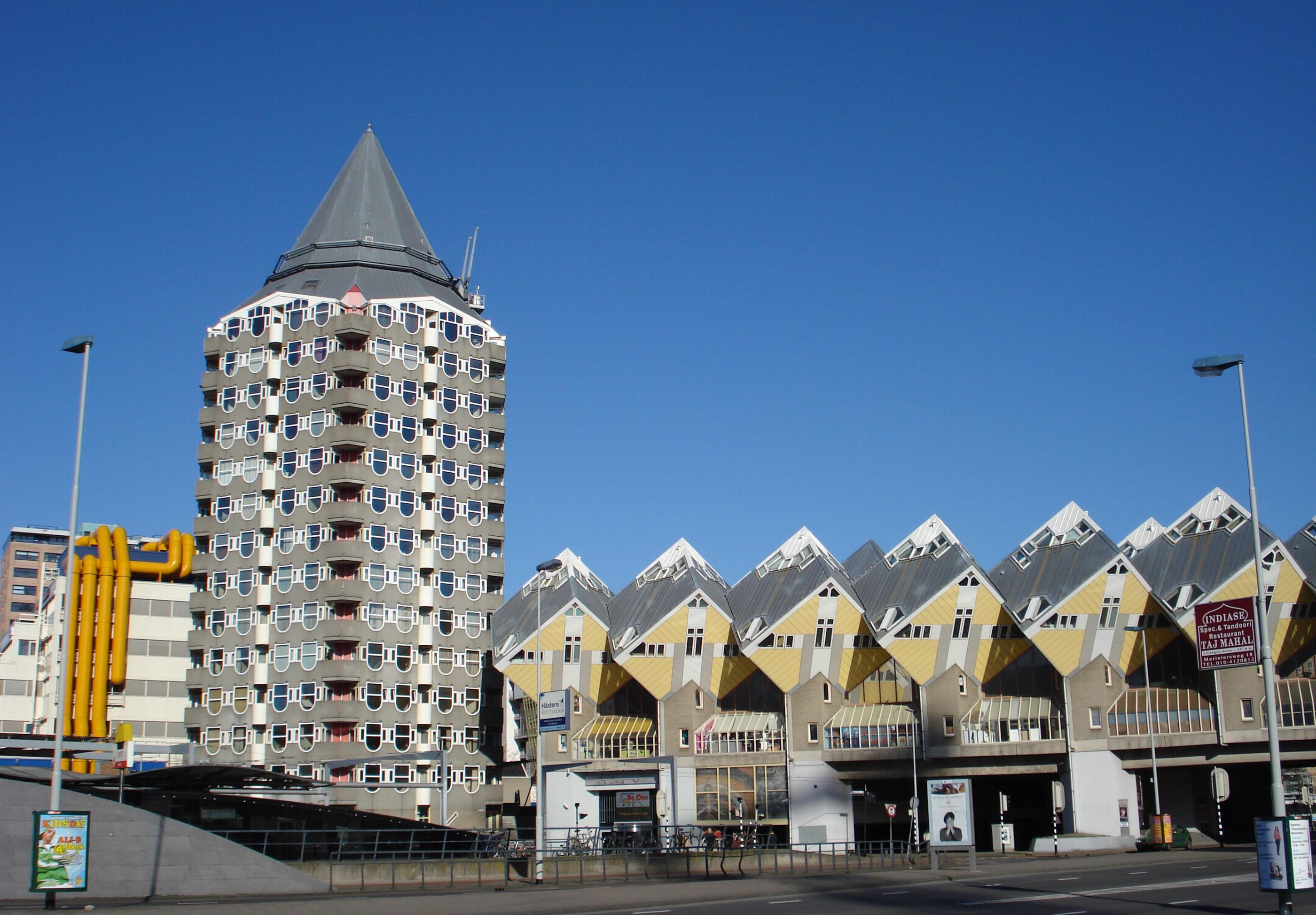 Rotterdam, Blaak. Het Potlood-gebouw en de kubuswoningen.